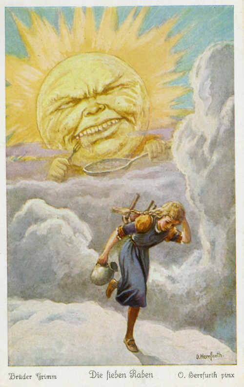 Die sieben Raben. Postkartenserie nach dem Märchen. Serie von sechs Postkarten der Firma Uvachrom. Serie 320, Nr. 4889. Text der Rückseite: Das Töchterchen konnte die Eltern über den Verlust der sieben Söhne nicht trösten. Als es größer wurde, nahm es Brotlaib, Stühlchen und Krüglein und machte sich auf, die Brüder zu suchen und zu befreien. Da kam Schwesterchen zur Sonne. Die war heiß und fraß die kleinen Kinder. Da lief es weg.